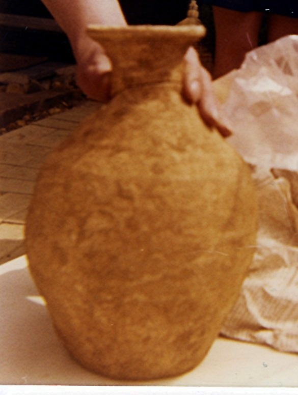 Fränkischer Knickwandtopf, Grabfund des Jahres 1974 in Ahrem (Erftstadt)